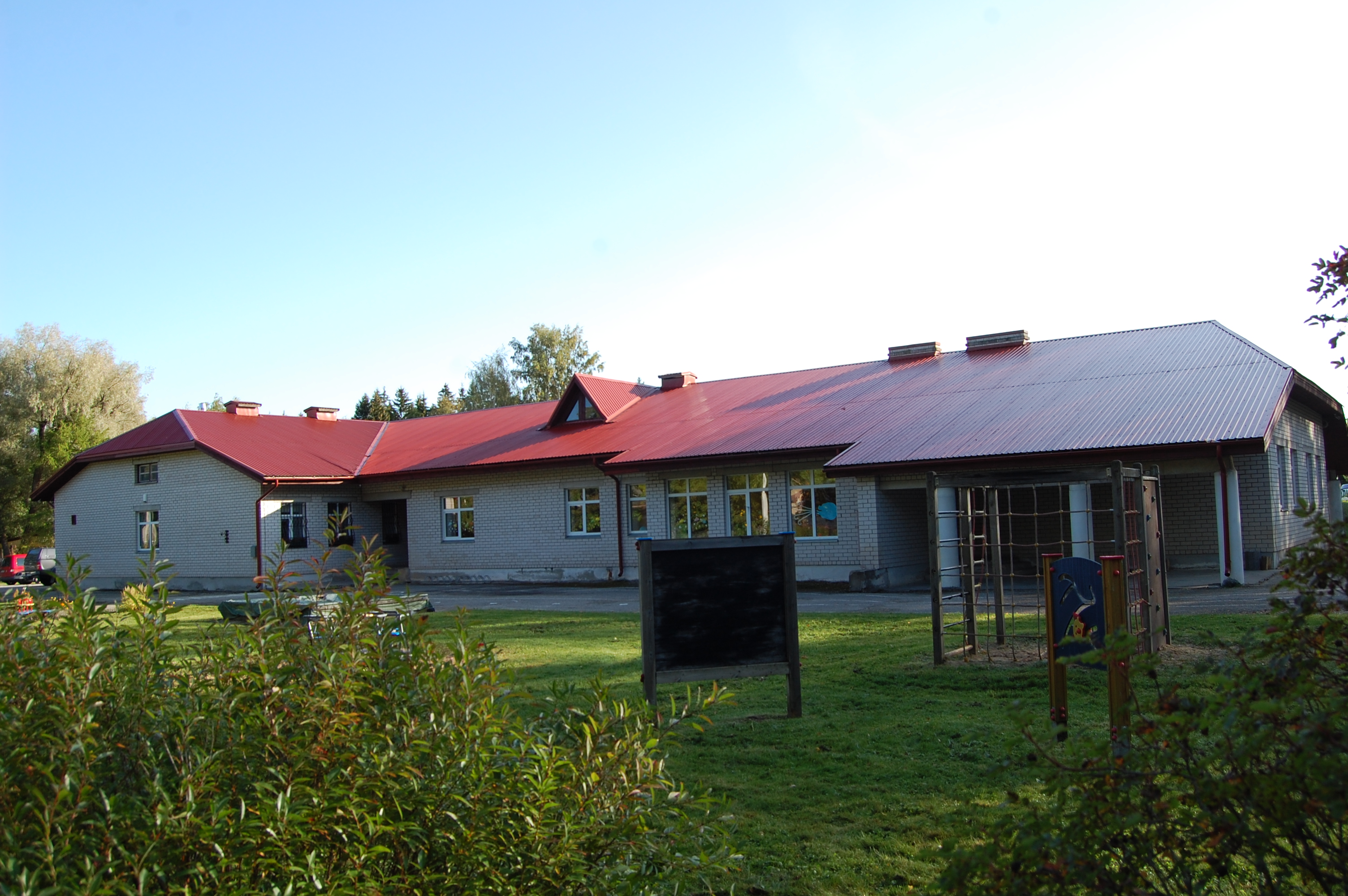 Esku lasteaed Põltsamaa vallas 2019. aasta septembris